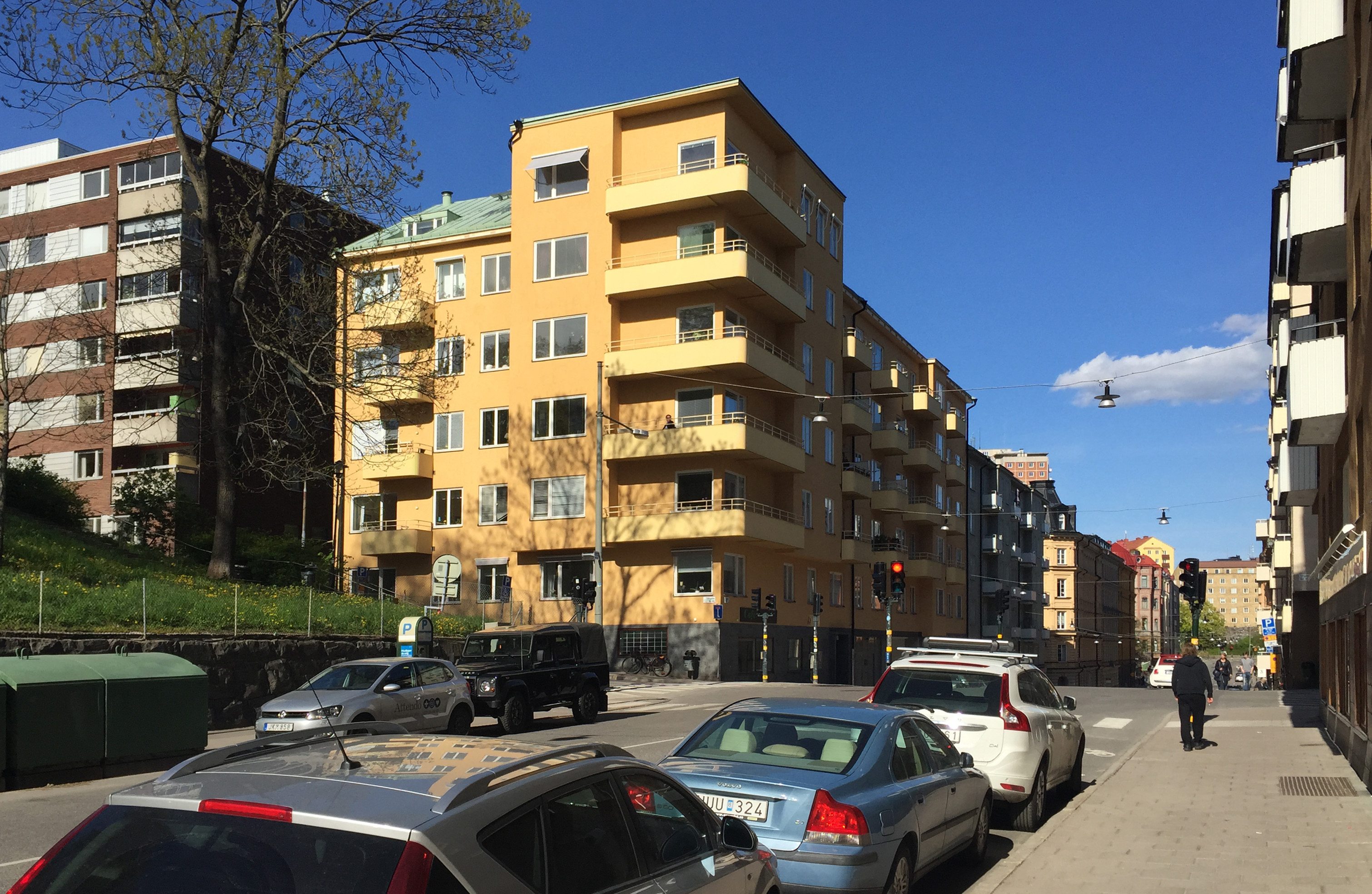 Vilan 11, Stockholm Frejgatan 18-20 / Tulegatan, Nybyggnadsår 1940, Oscar Jansson (Byggmästare) Oscar Waller (Arkitekt) Sleipner AB (Byggherre)